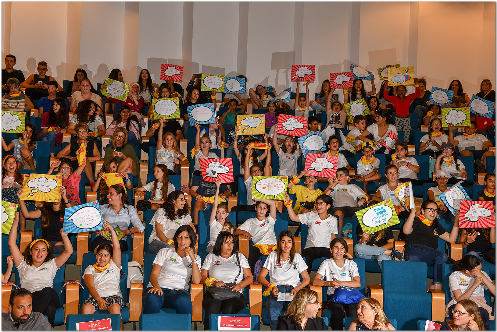 כנס שיתוף הפרויקטים- שנת 2018 תלמידים מעשרות בתי ספר נפגשים לחלוק את סיפורי השינוי שהם יצרו.